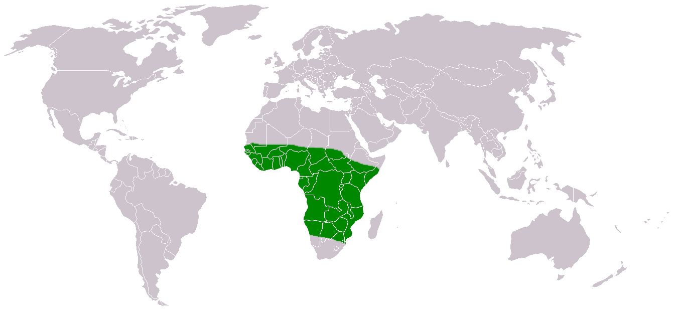 Rotbrust-Glanzköpfchen (Chalcmitra senegalensis - Nectarinia senegalensis)